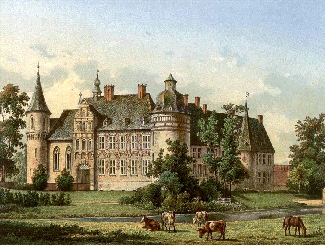 Haus Assen, Kreis Beckum, Provinz Westphalen, Lithografie aus dem 19. Jahrhundert